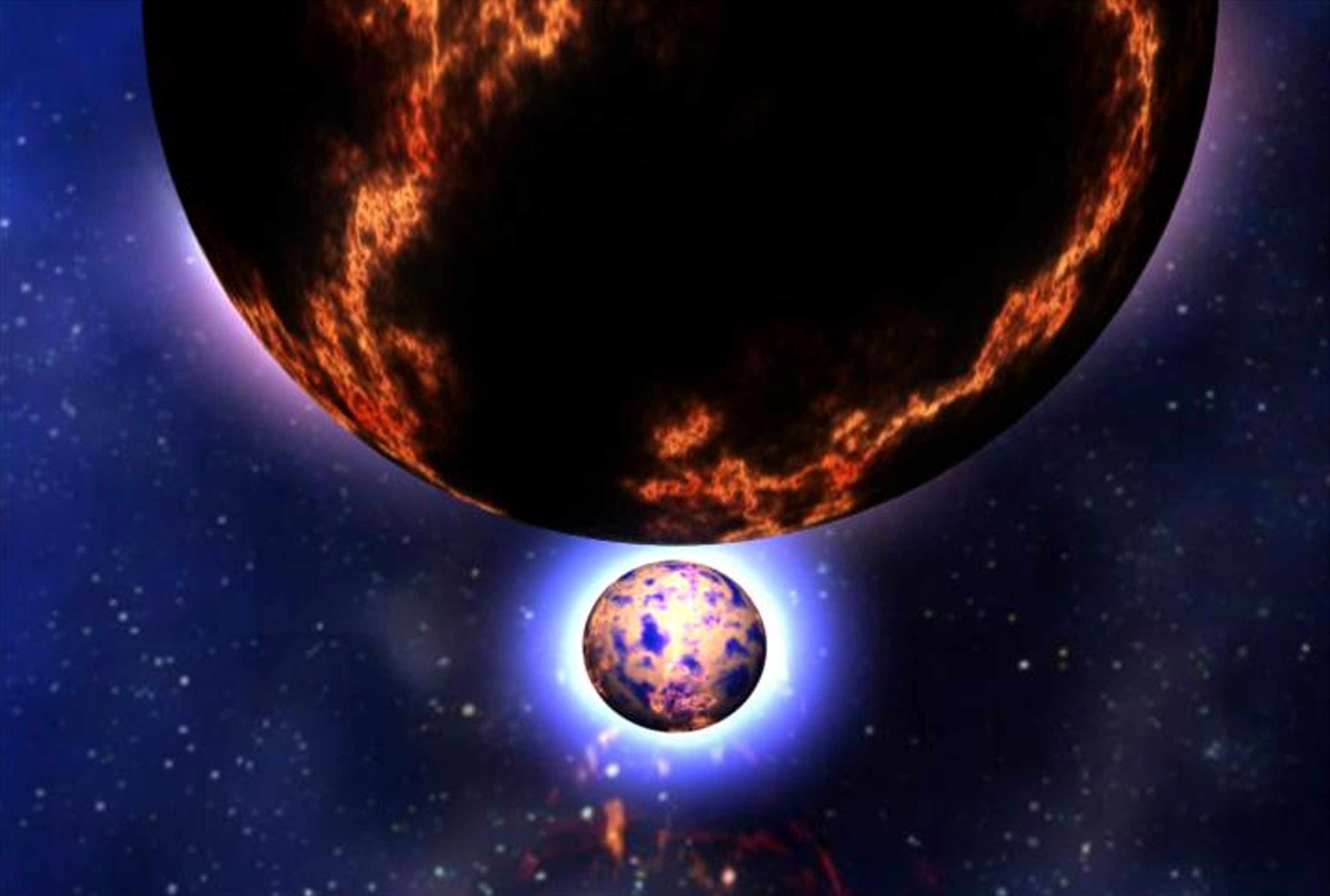 Die oorsprong van goud: Dit is onseker waar en hoe goud ontstaan. Die relatiewe gemiddelde van die voorkoms van goud in ons sonnestelsel blyk meer te wees as wat in die vroeë heelal, in sterre of selfs in tipiese supernova-ontploffings gevorm kon word. Sommige astronome meen dat neutronryke swaarmetale soos goud die maklikste in neutronryke ontploffings, soos die botsing tussen neutronsterre, gevorm kan word.